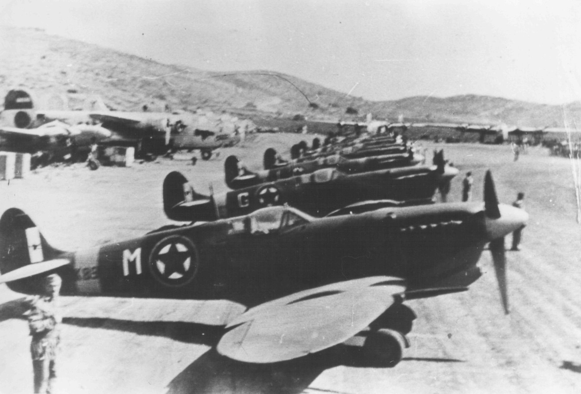 Srpskohrvatski / српскохрватски: Avijacija NOVJ na Visu 1944